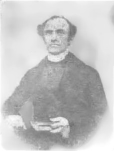 Enrico Tazzoli (1812-1852), patriota, martire di Belfiore. Foto del 1850